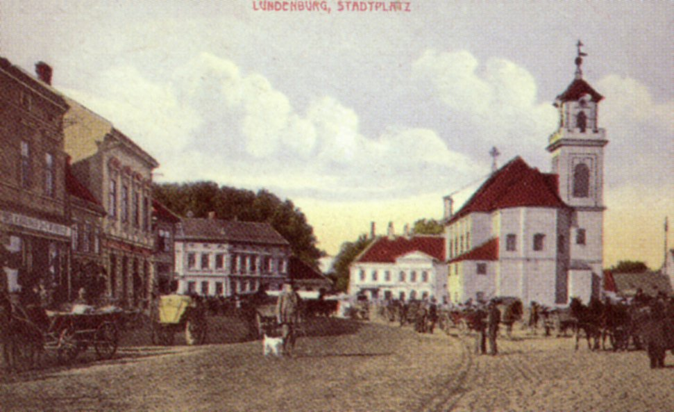 Postkarte Lundenburg, Stadtplatz (Anfang 20. Jh.)